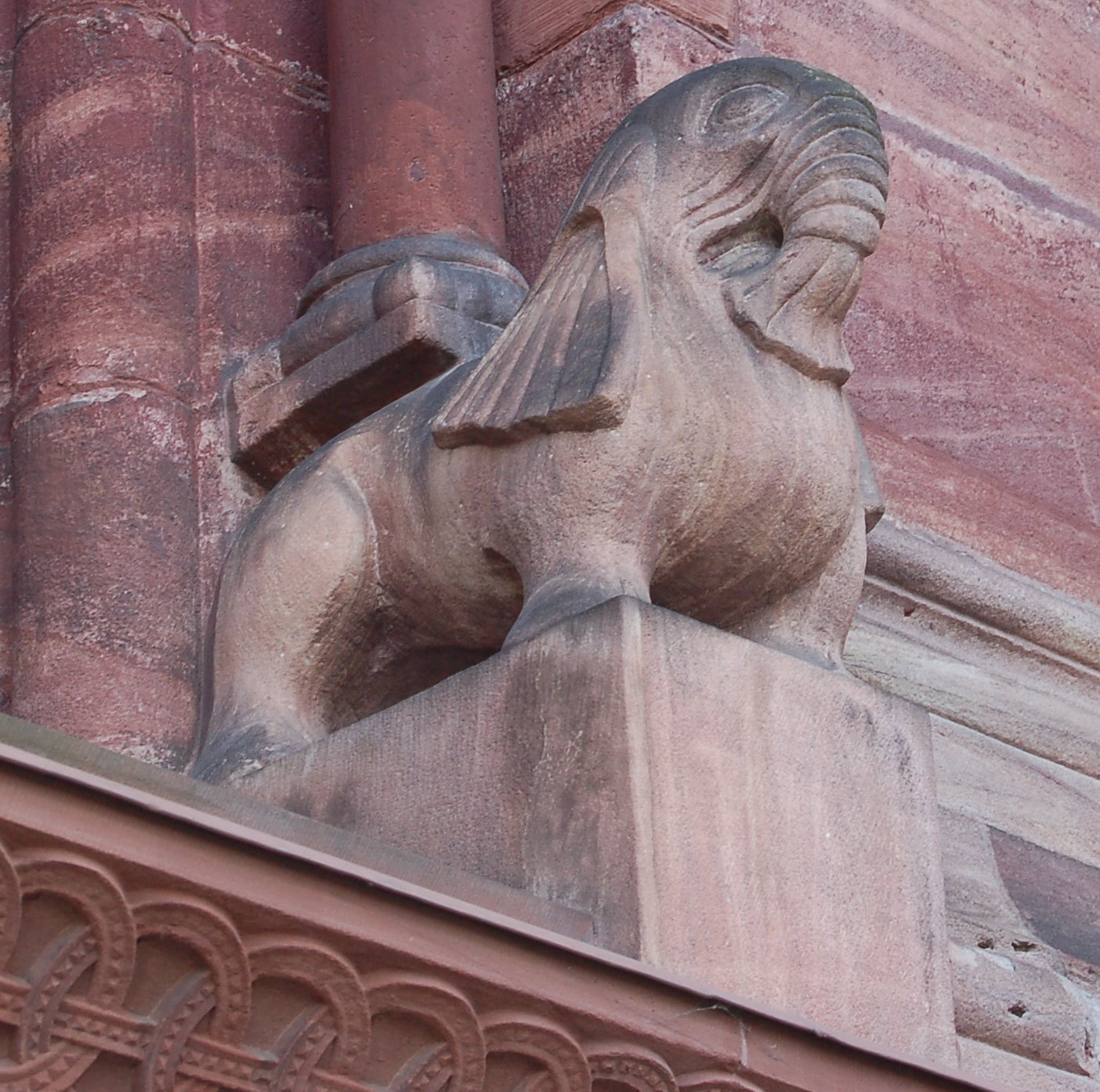 Figur eines Elefanten am Basler Münster (für die GNU FDL)